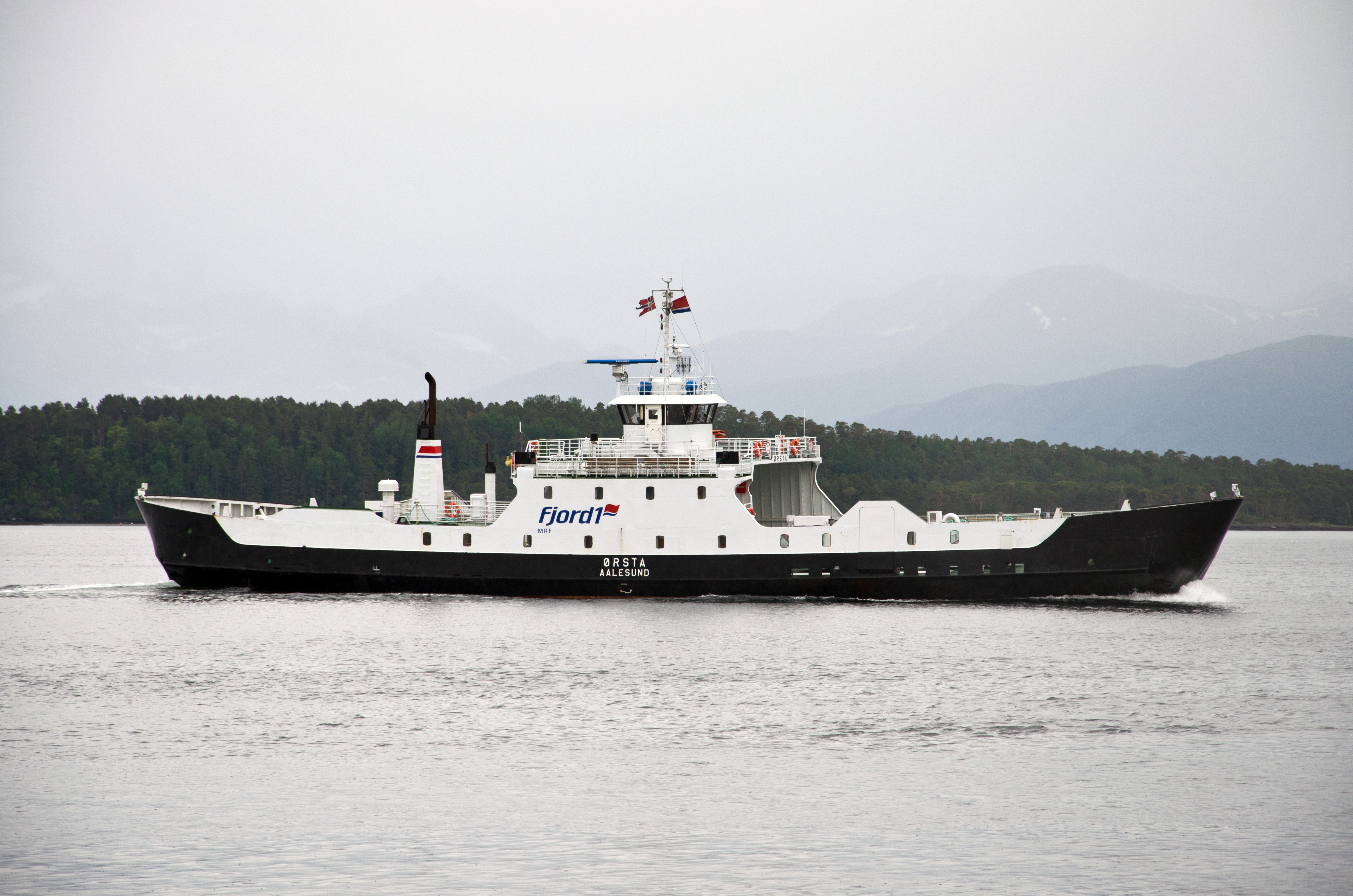 MF «Ørsta» trafikkerer fergesambandet Molde – Sekken